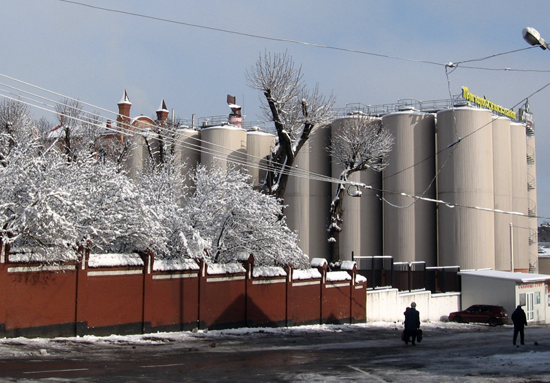 Территория Львовского пивзавода